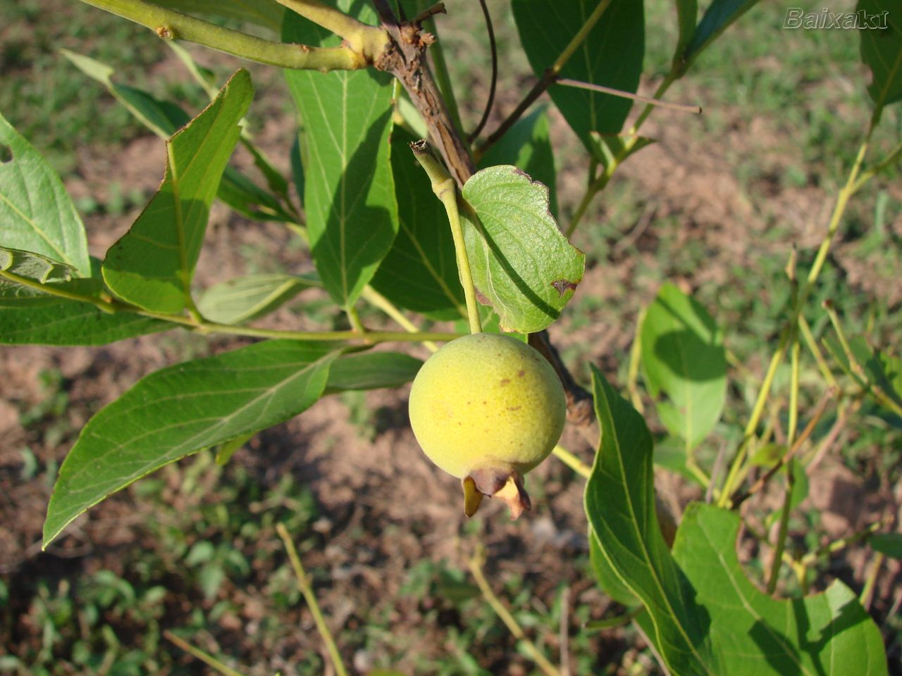 Fruto da Guabiroba - Guabiroba, or Gabiroba fruit